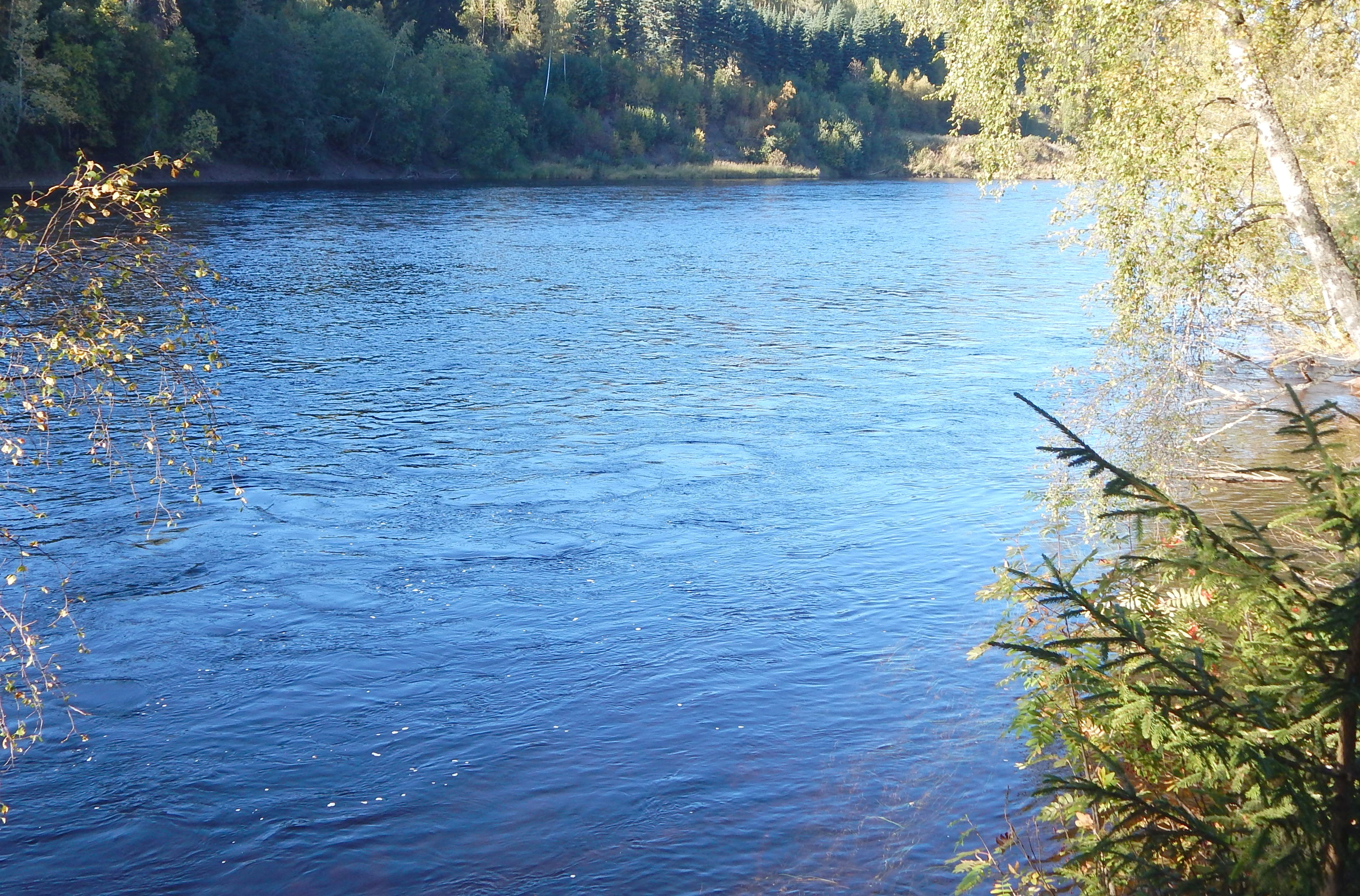 Elven Rena oppstrøms fra tettstedet Rena